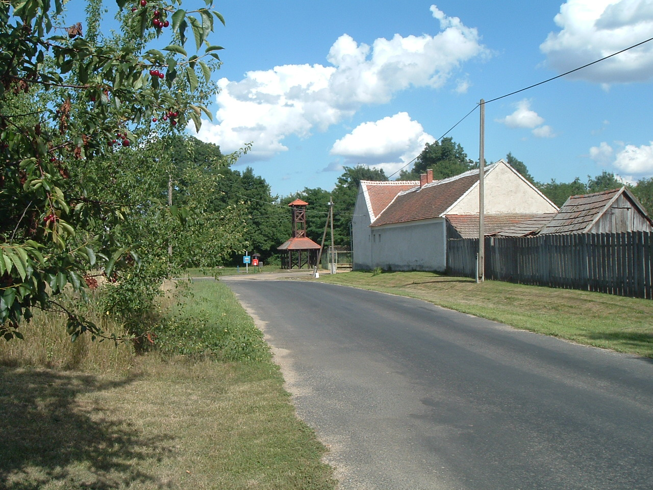 Geregye (Gyanógeregye), Hungary